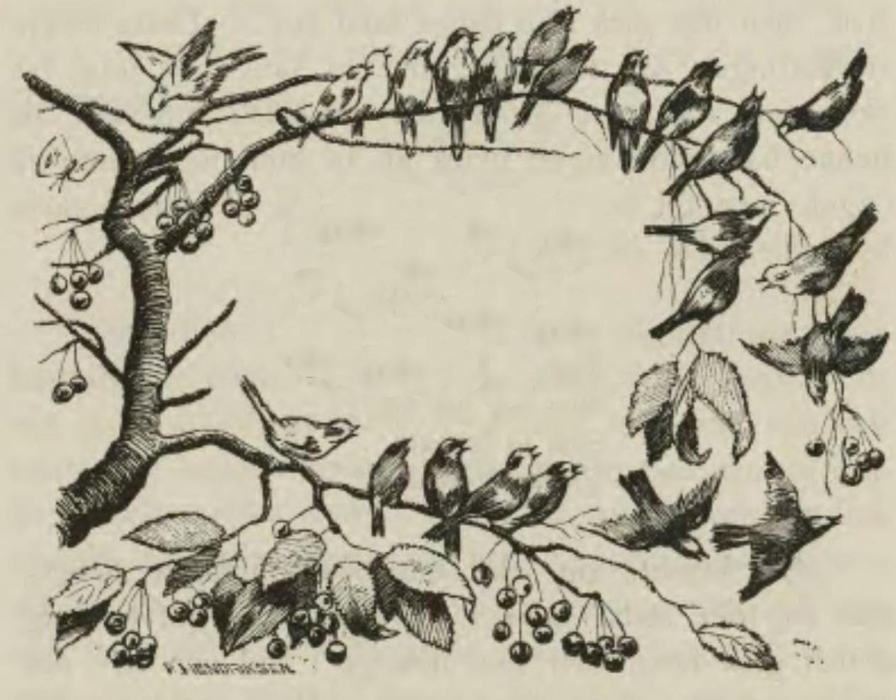 Sagobok för barn